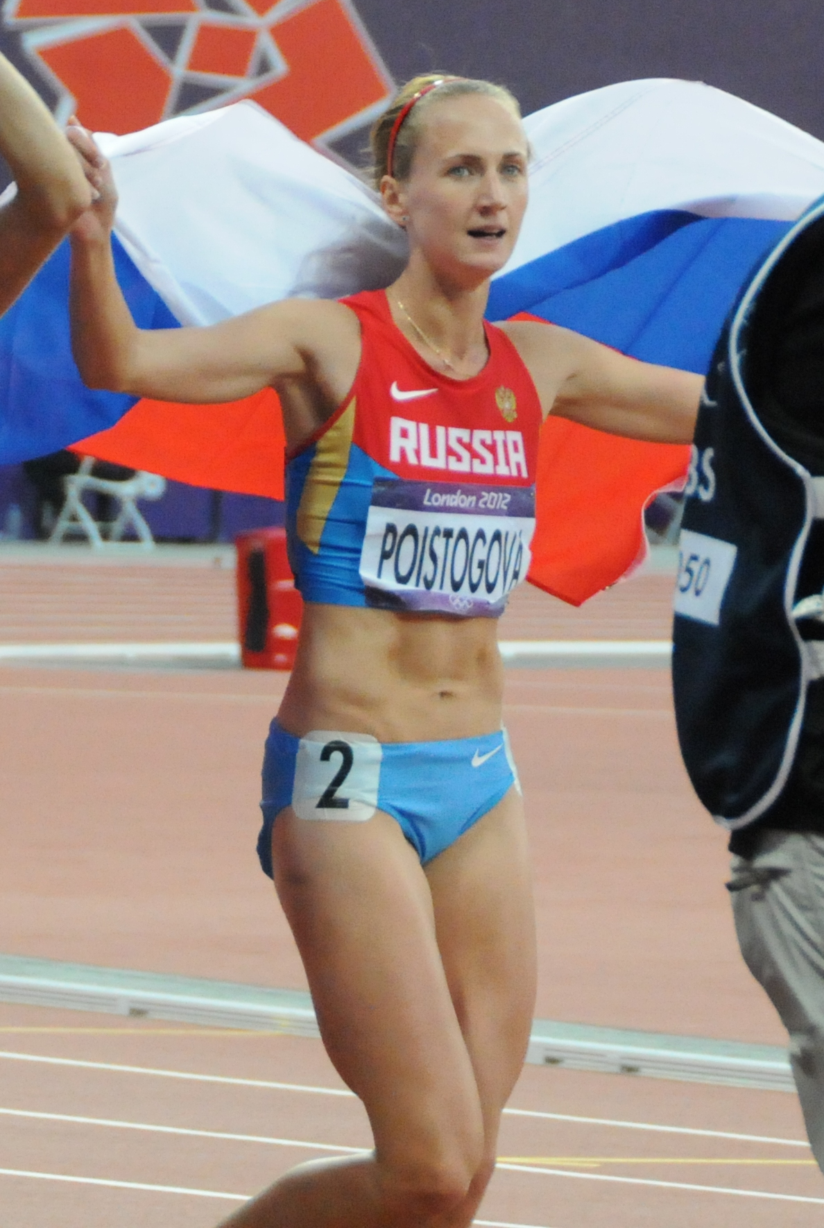 La médaille d'or et de bronze du 800m: Mariya Savinova et Ekaterina Poistogova